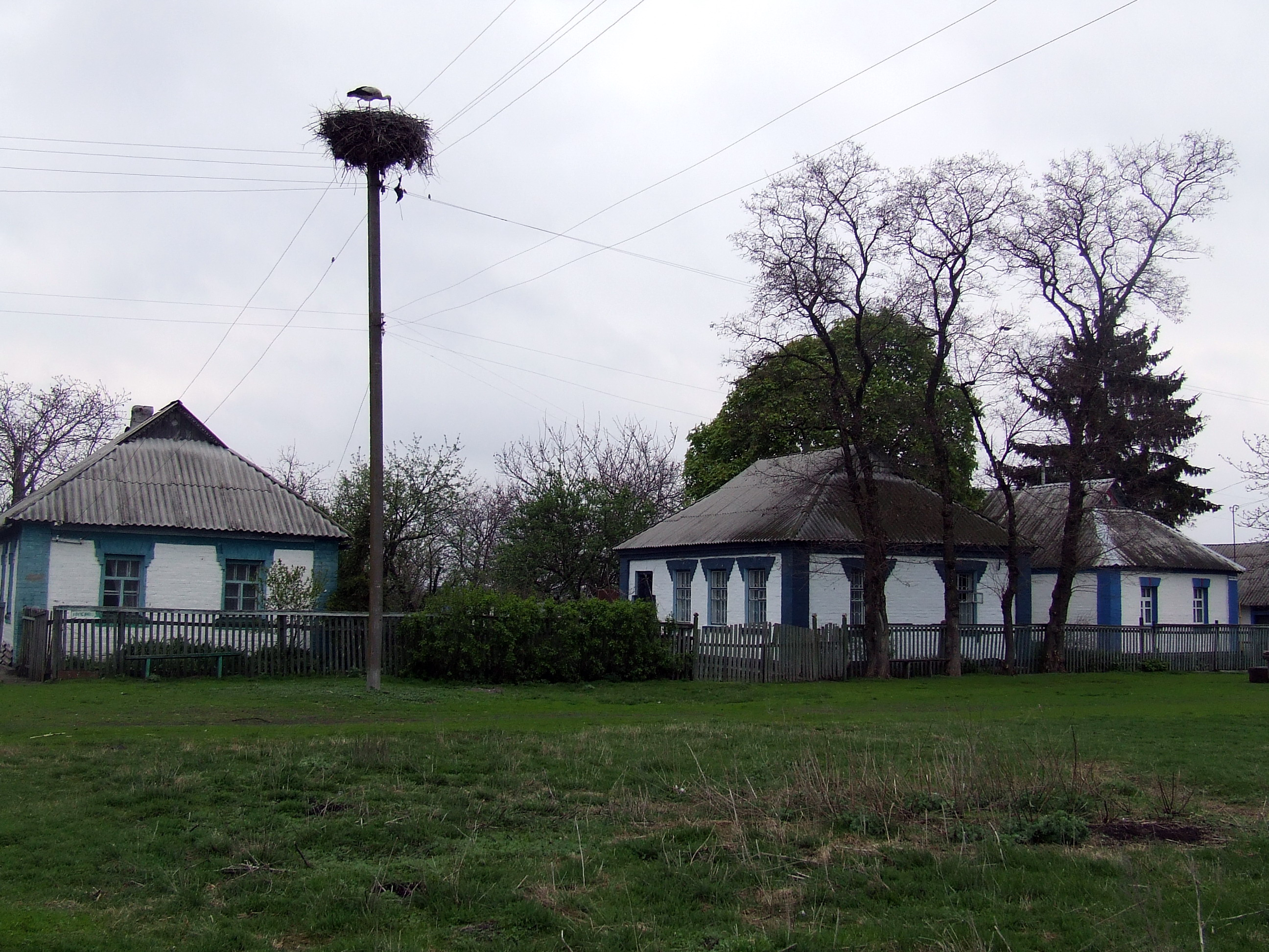 Вулиця Кооперативна в селы Йосипівка